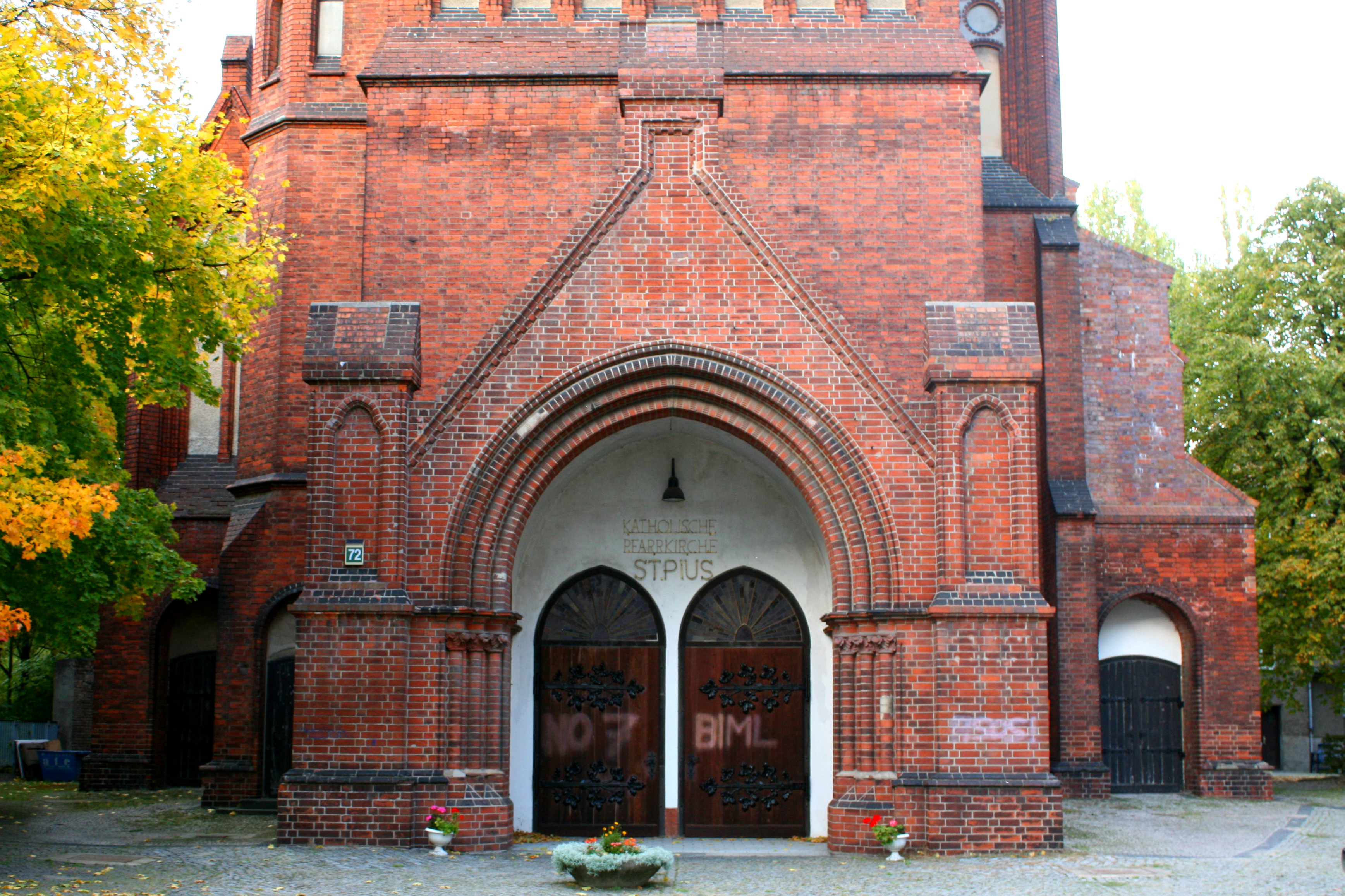 Eingang der St. Pius-Kirche in Berlin-Friedrichshain